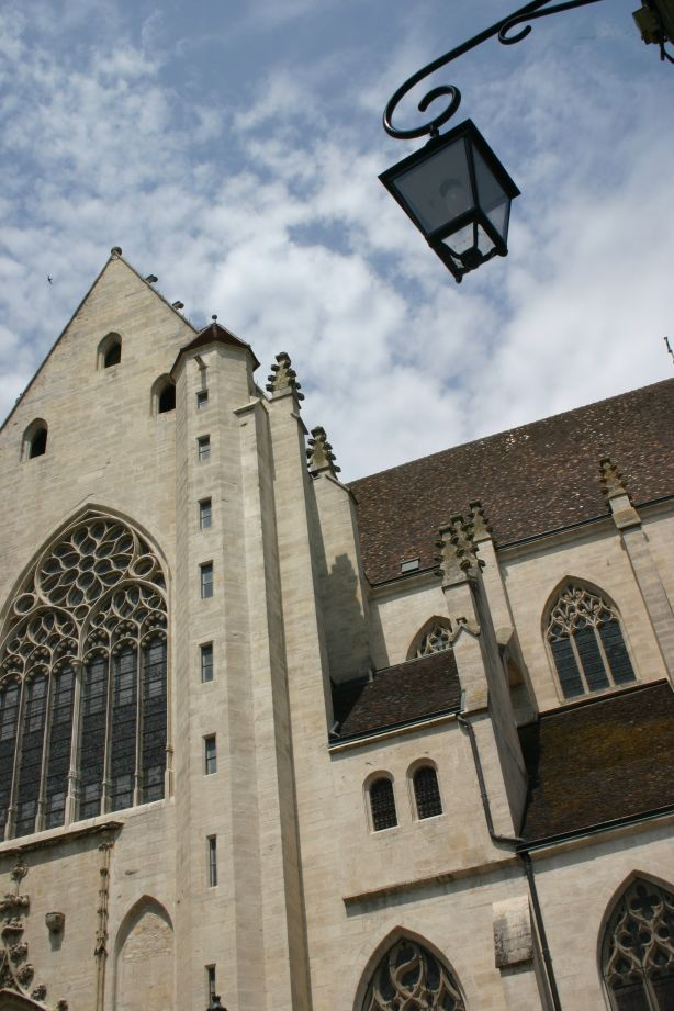 La collégiale de Dole en France qui est une basilique mineure, et non une cathédrale d'après certaines idées reçues.